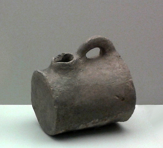 Botijo argárico (1.700-1.200 a.C). Hallado en el yacimiento de Puntarrón Chico, Beniaján (Región de Murcia).